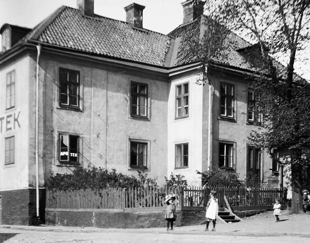 Apoteket Wasen på Djurgården